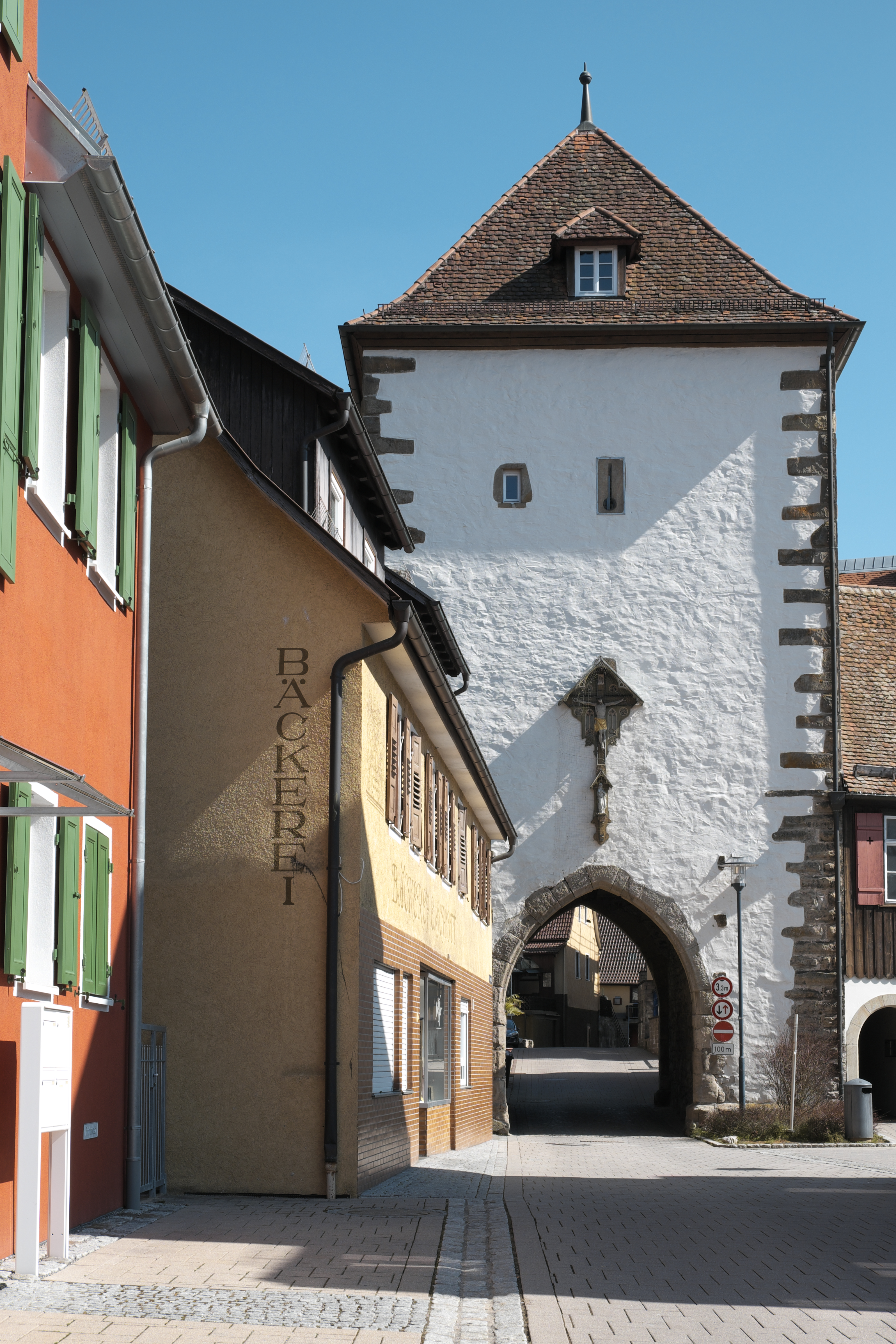 Luziferturm in Horb am Neckar im Landkreis Freudenstadt (Baden-Württemberg/Deutschland)